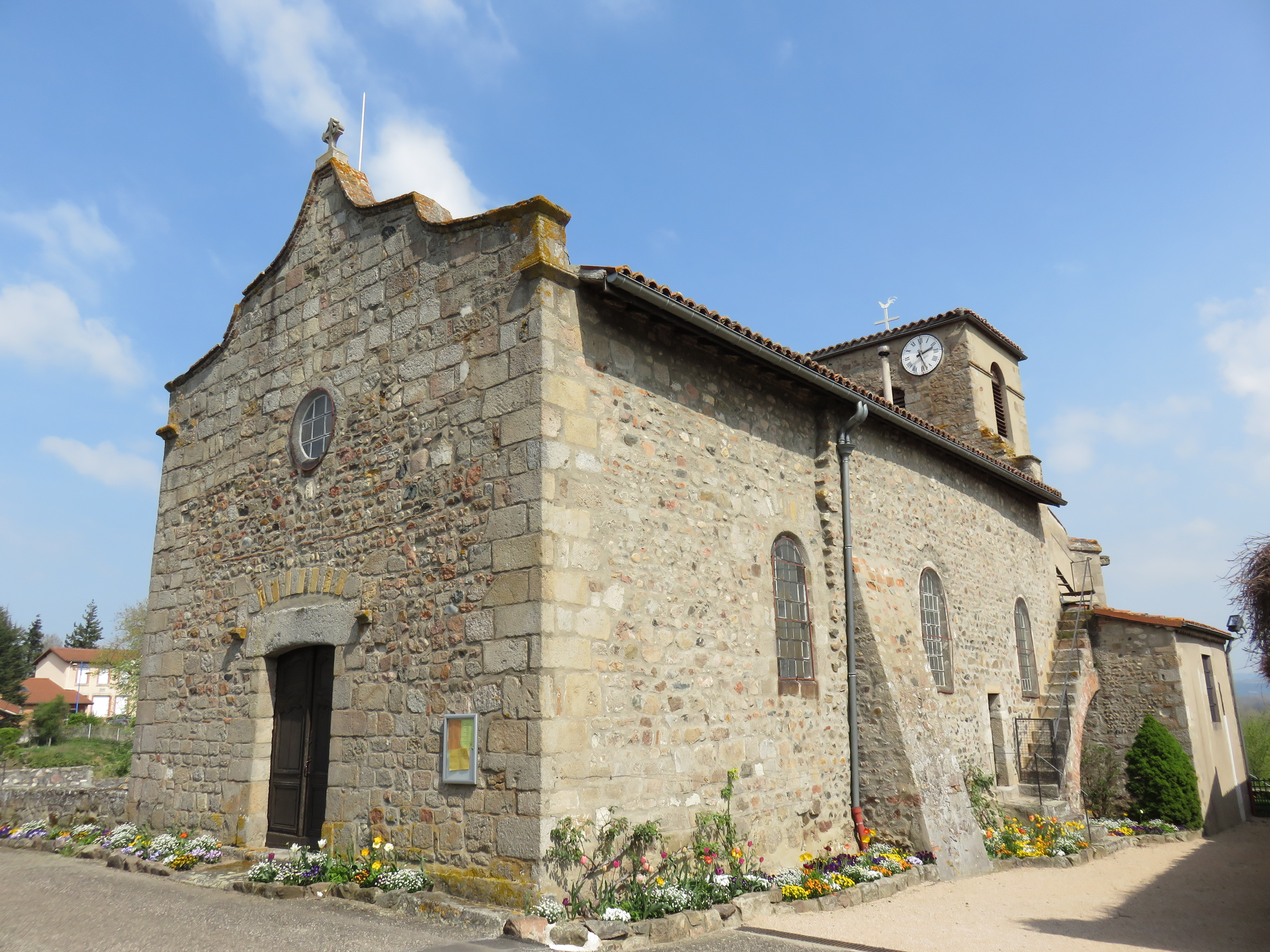 Église de la Nativité-de-Notre-Dame de Cleppé (Loire, France).